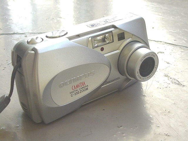 Appareil photographique numérique Olympus Camedia C-350 Zoom